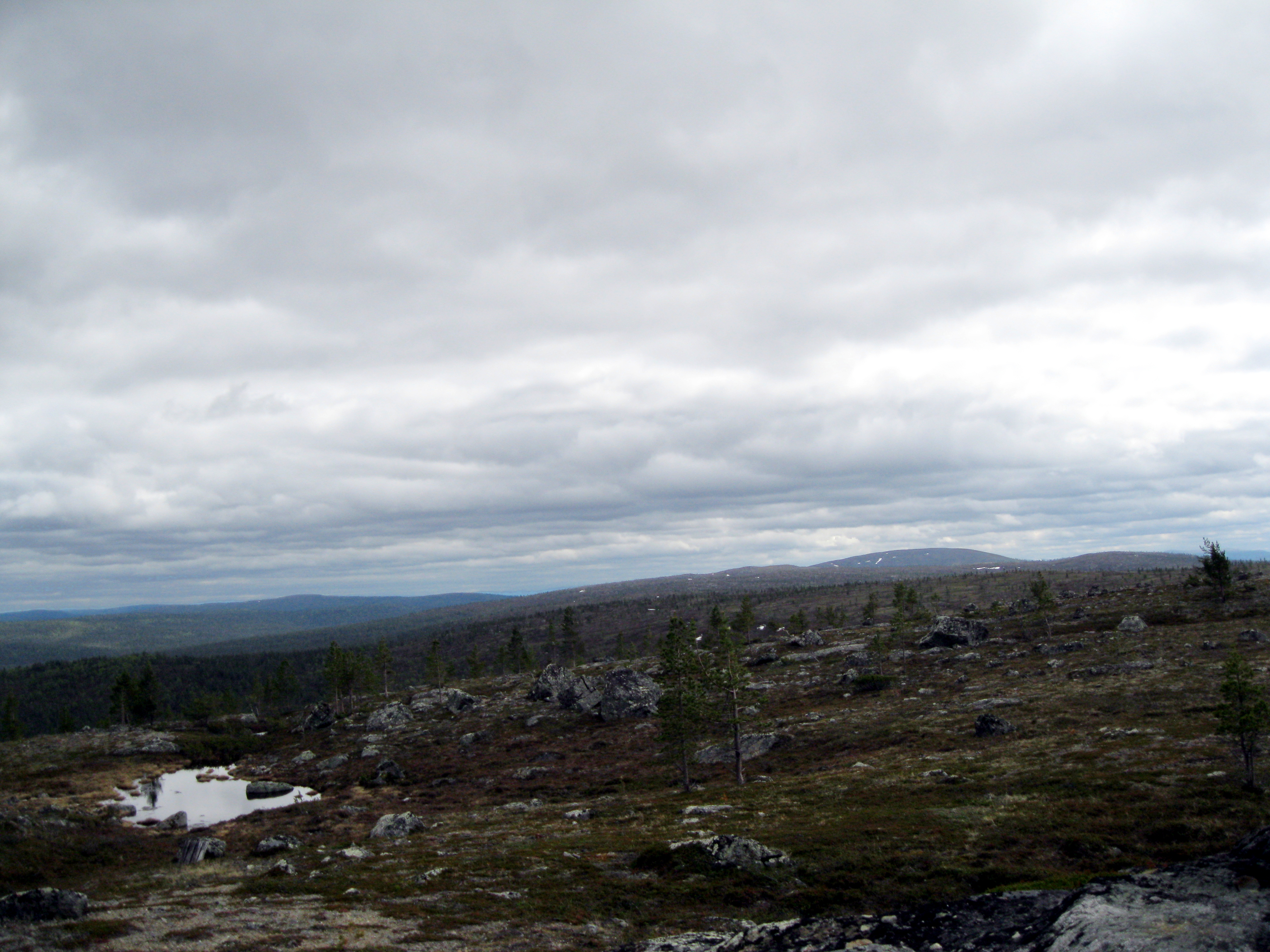 Maisemaa Sarmitunturilta, Tsarmitunturin erämaa-alueella, kesäkuussa 2012.